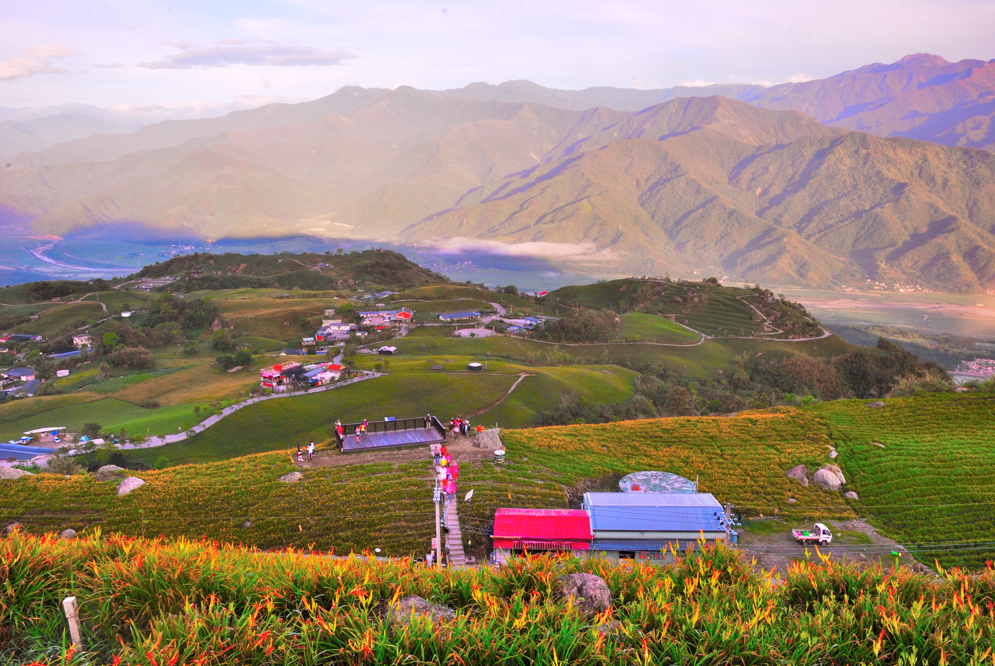 983, Taiwan, 花蓮縣富里鄉新興村